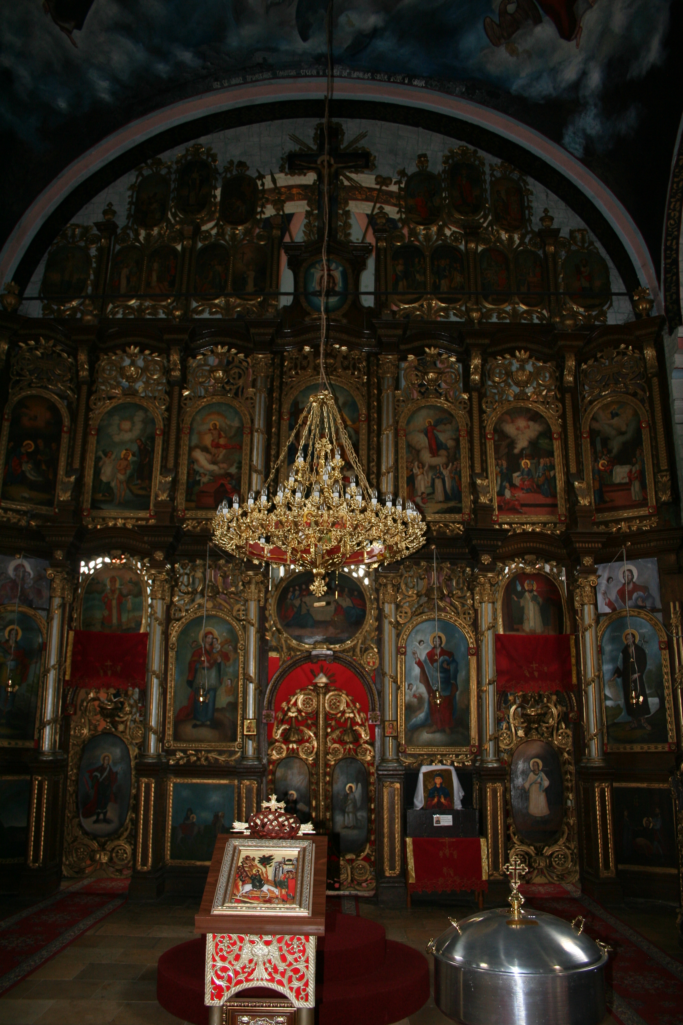 Crkva Sv. Georgija (Manđelos)